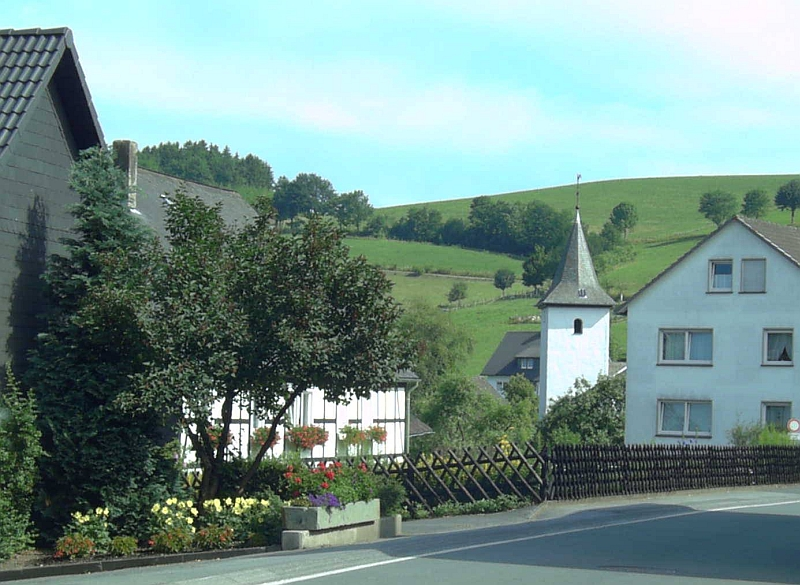 Oberhenneborn (Schmallenberg) Kirche, Germany.